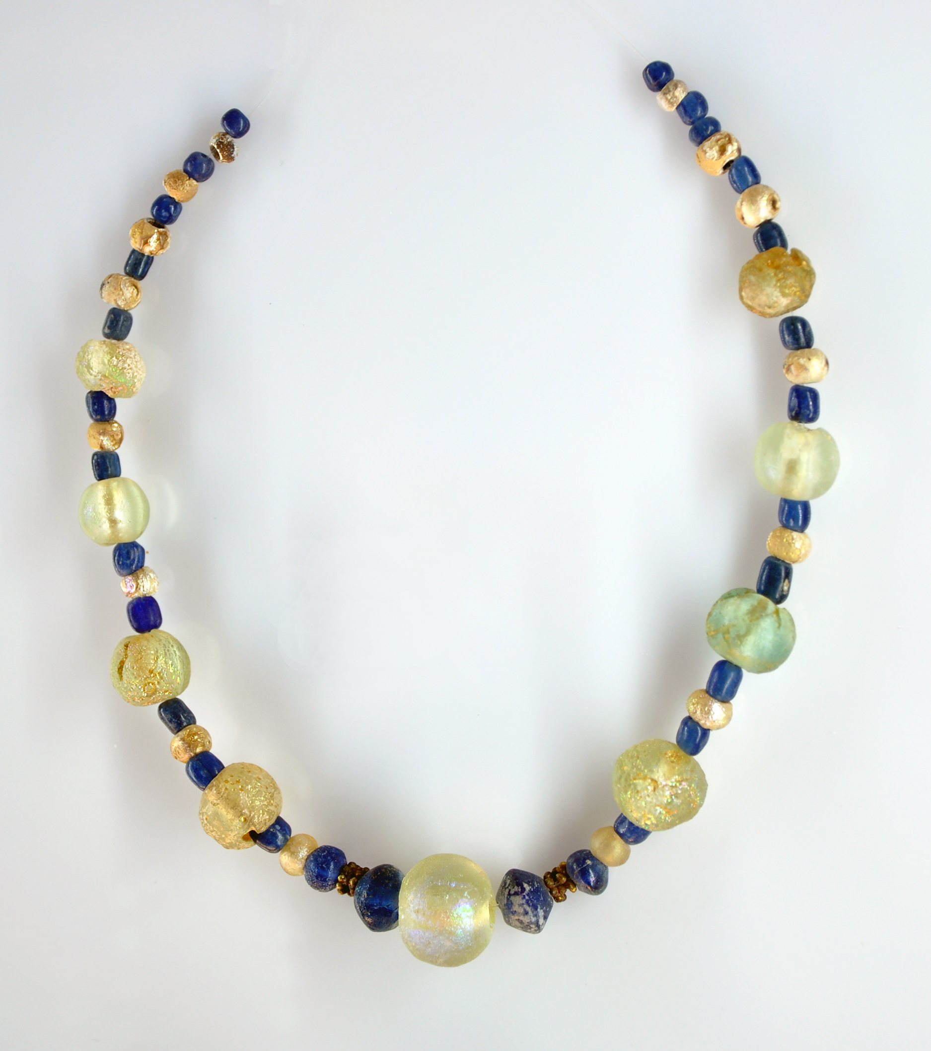 Collier en perles de verre, Amlash, Iran, 10ème - 8ème siècle - JC (?), fouilles de Ramat-Abad. Musées Royaux d'Art et d'Histoire, section des Arts Décoratifs, Parc du Cinquantenaire, Bruxelles.